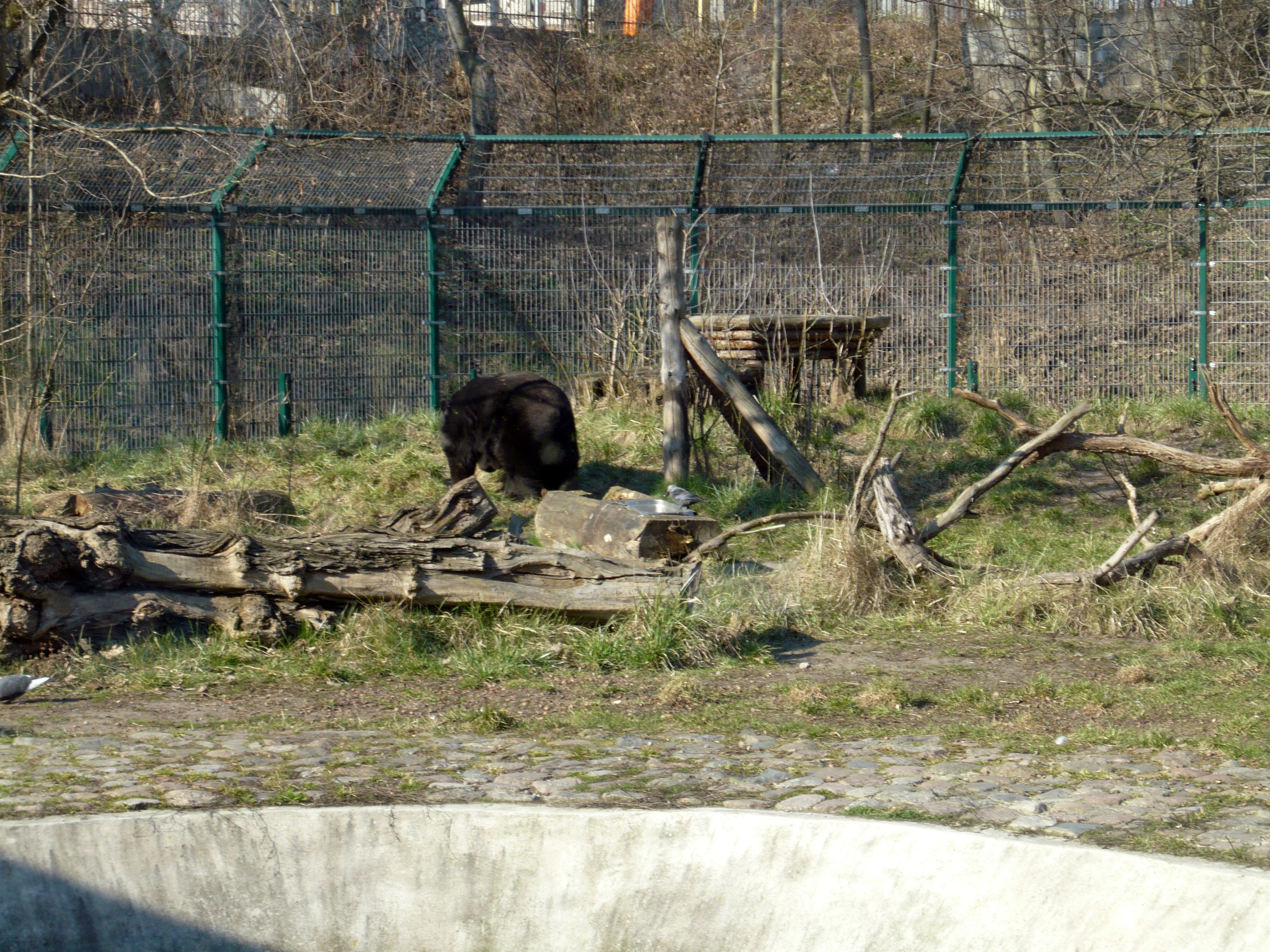 wybieg niedźwiedzi himalajskich w zoo w toruniu Nufiego i Wolty